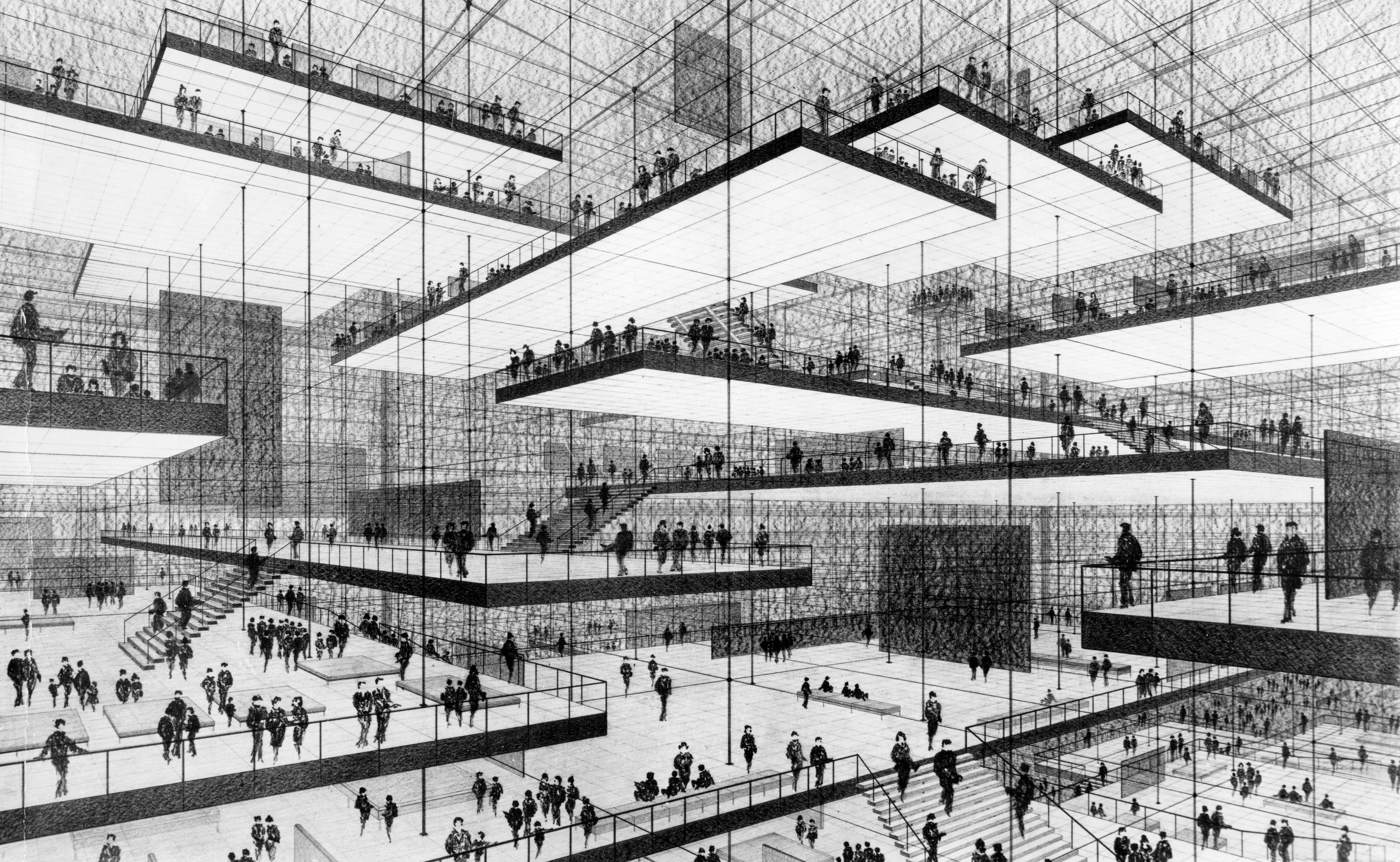 Entwurfszeichnung Raumnetz von Conrad Roland, 1964. 63,5 x 100 cm, Bleistift auf Lichtpause, Inv.-Nr. 883-002-001, Sammlung Deutsches Architekturmuseum